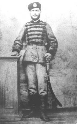 Стефан Караджа в четническа униформа